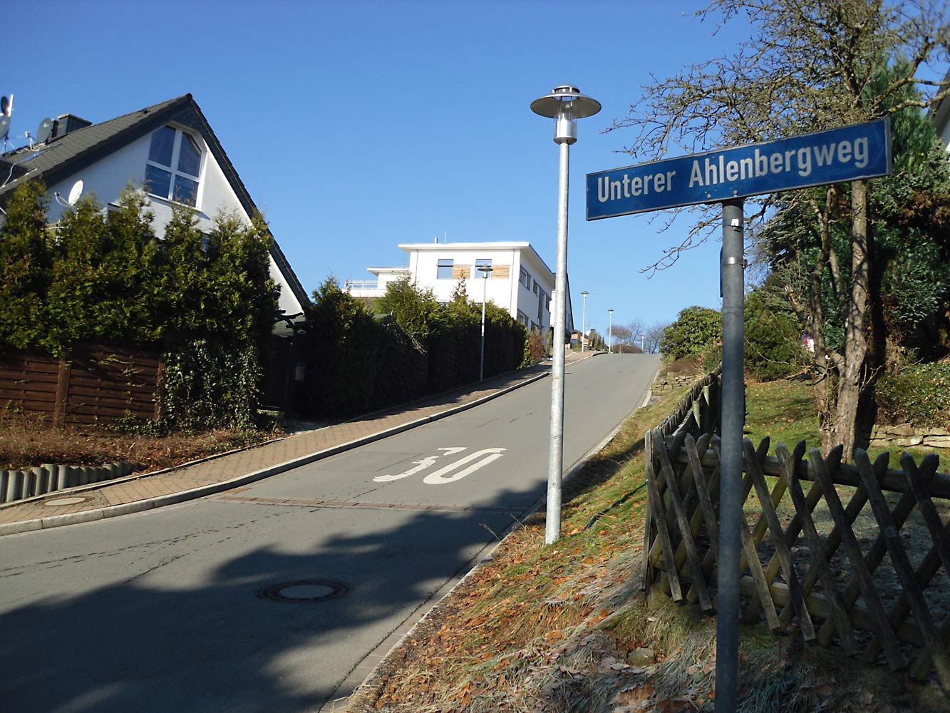 Herdecke-Ahlenberg